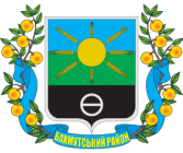 Герб Бахмутського району Донецької області